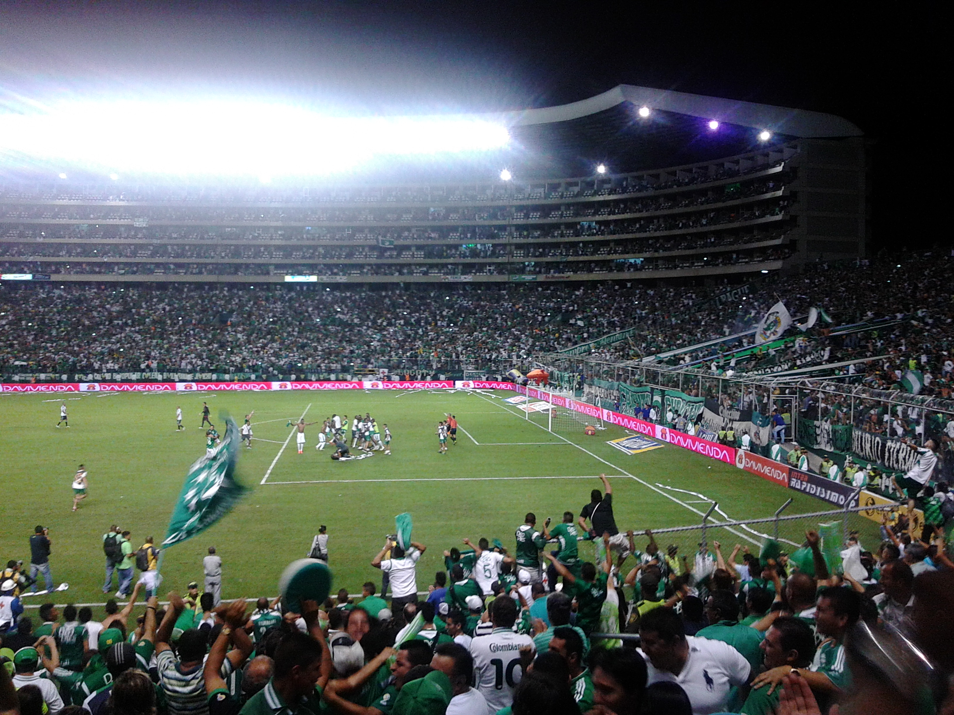 Segundo encuentro de la semifinal entre Deportivo Cali y Millonarios, que se saldó con un 1-0 a favor de los locales, y en penales 4-3 a favor de loo azucareros, que clasificaron a la final.